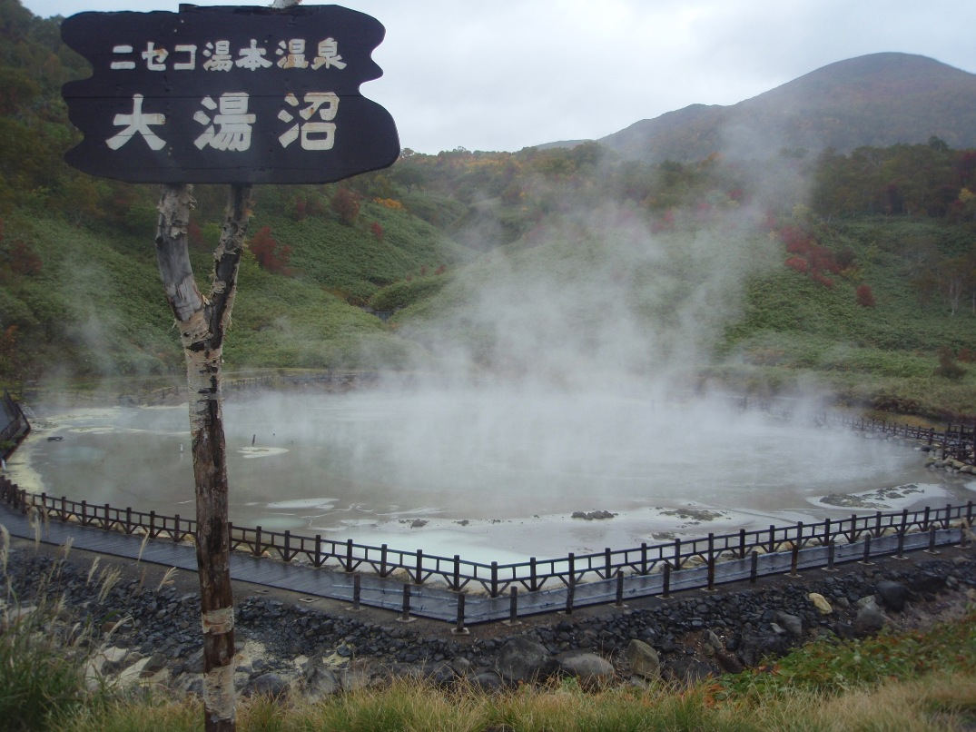 ニセコ湯元温泉横にある大湯沼